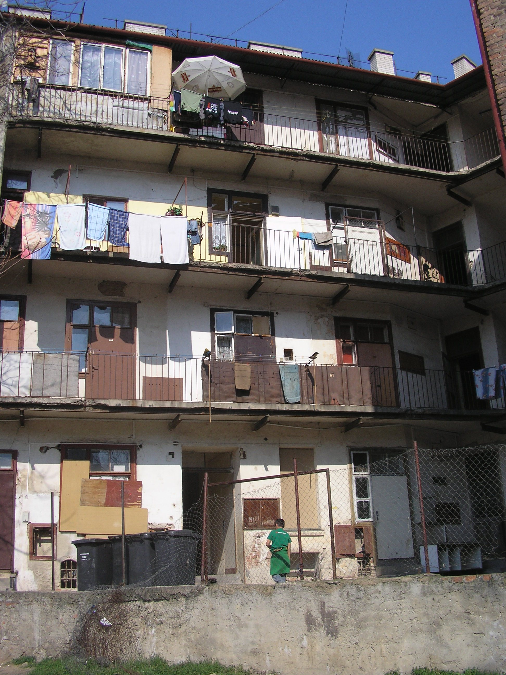 Pavlačový dům v Brně, Kopečná ulice (pavlač směrem do Vodní ulice)